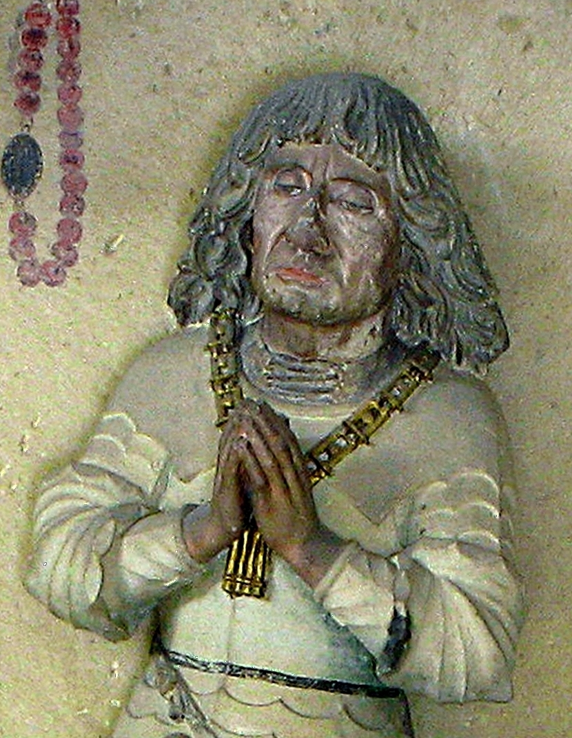 Altaraufsatz des Jörg von Sachsenheim, 1489, Sandstein, Stuttgart, Hospitalkirche. – Ausschnitt: Halbfigur de Jörg von Sachsenheim.